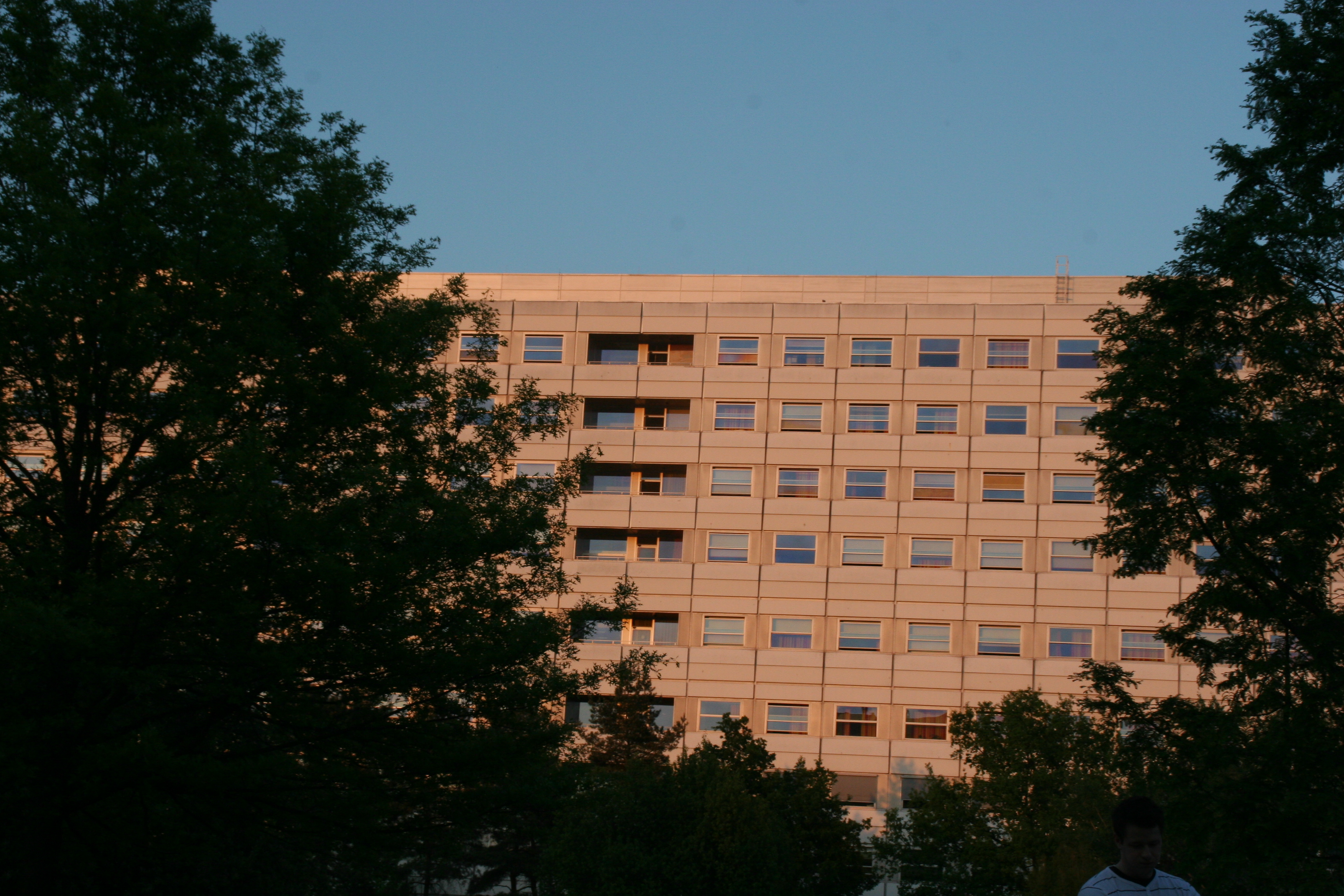 Bettenhaus 1 der Klinik